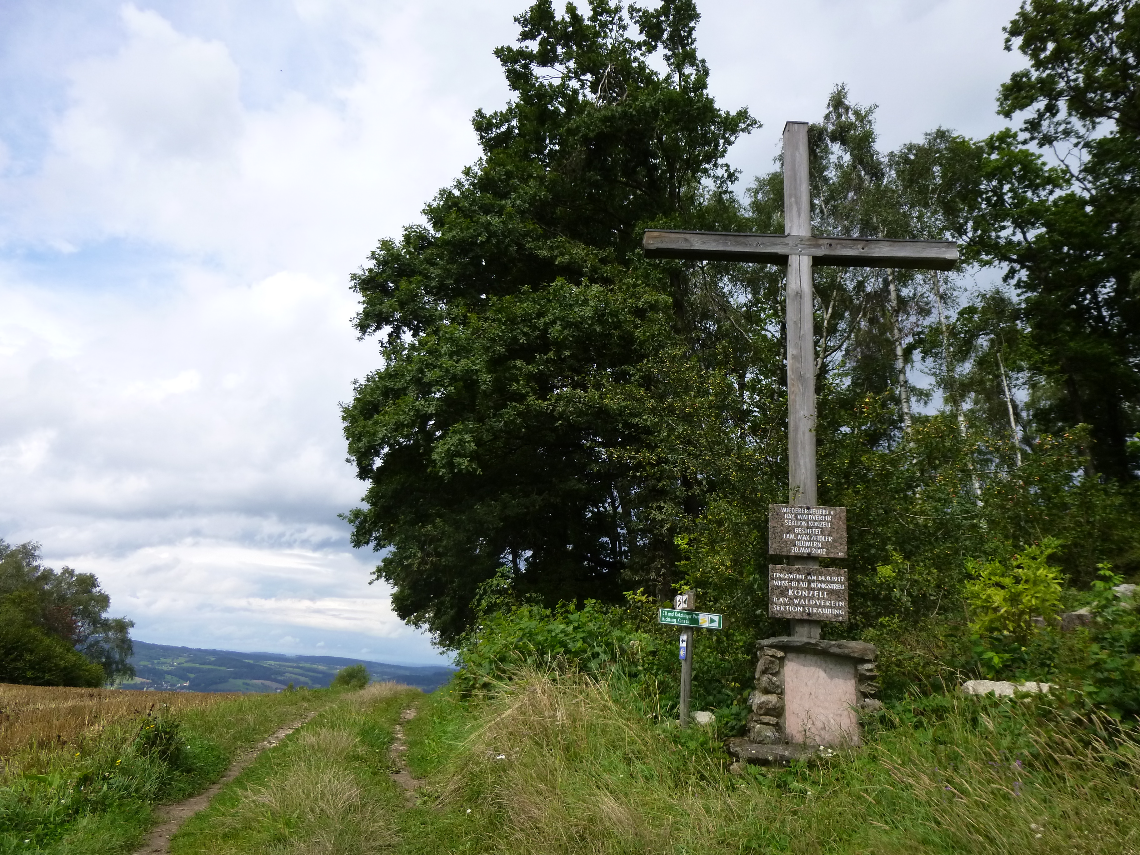 Kreuz etwa 125 Meter westlich vom Gipfel des 710 m hohen Gallner Berg im Gemeindebereich Konzell, Landkreis Straubing-Bogen, Niederbayern. Wanderwege führen von den Orten Landorf, Stallwang, Herrnfehlburg und Denkzell auf diesen markanten Gipfel im Vorderen Bayerischen Wald.